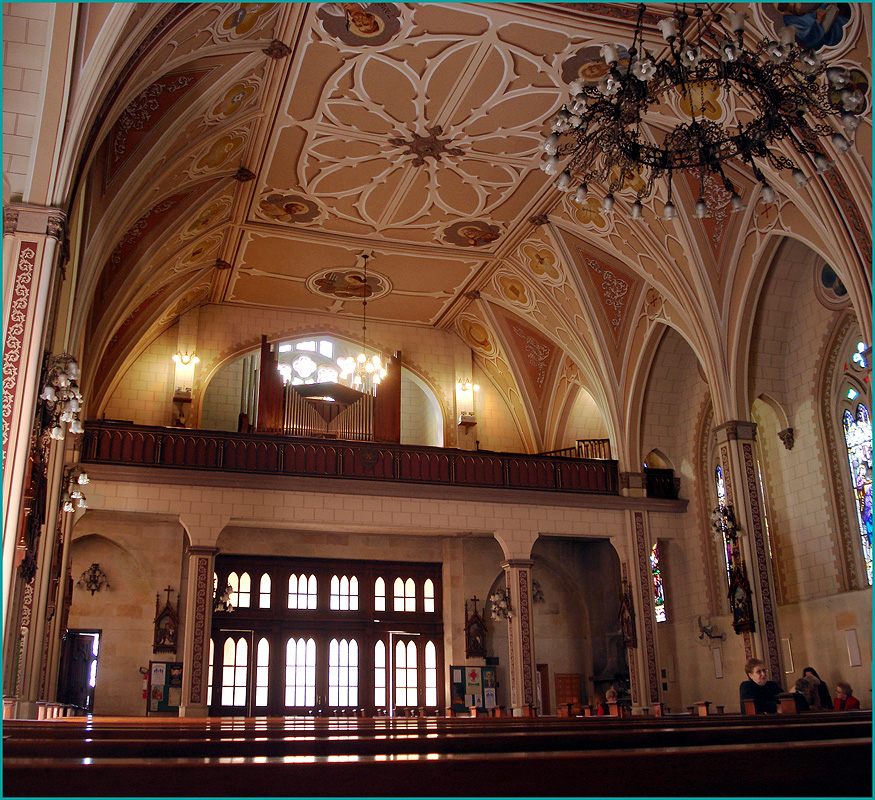 Interior da Igreja de São Pedro, Porto Alegre, Brasil. Entrada e coro